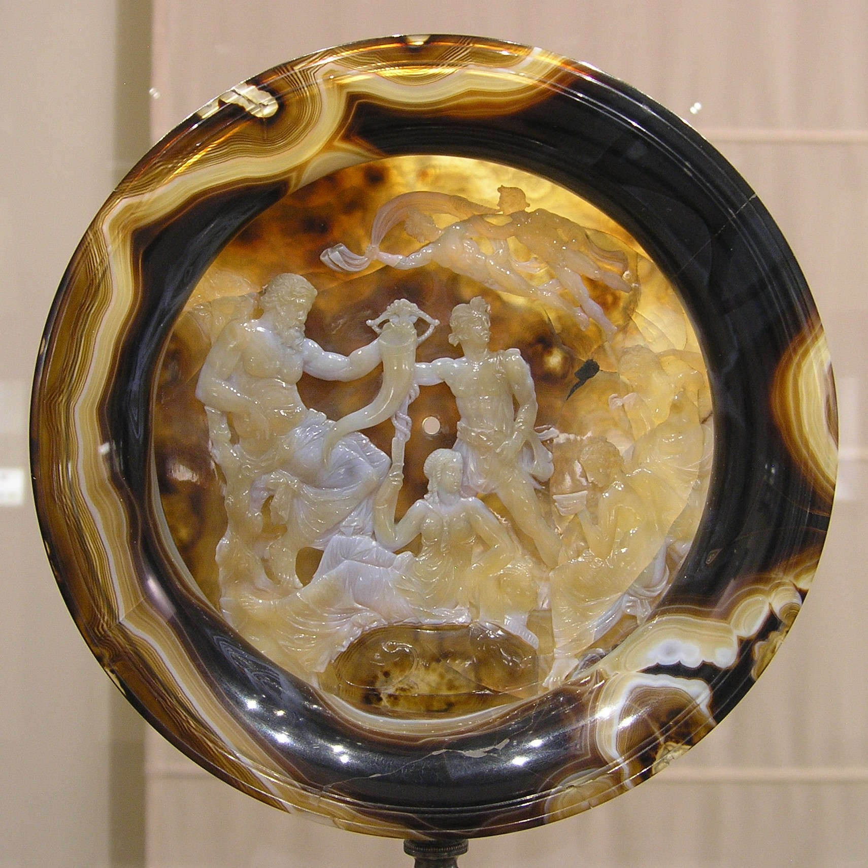 Inside: allegorical scene. Outside:gorgoneion. front view